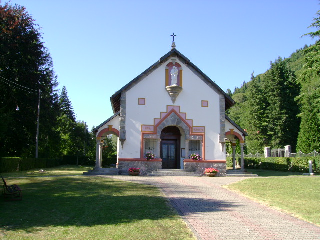 La chiesetta di Pian Nava è solo una succursale di quella di Bee, può contenere al massimo una cinquantina di persone.